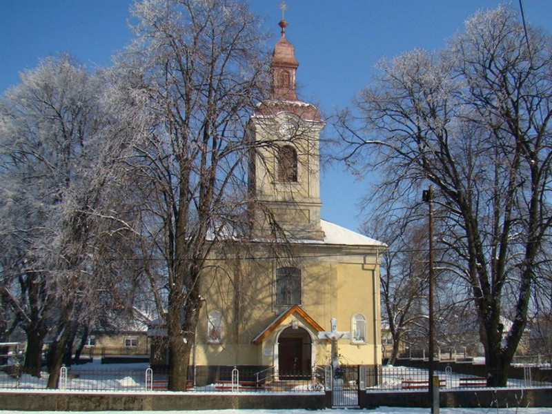 Szent Anna-plébániatemplom (Rátka)